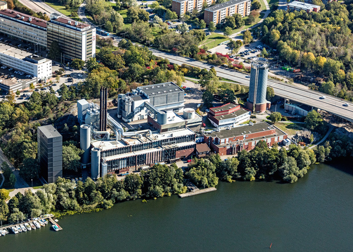 Solnaverket